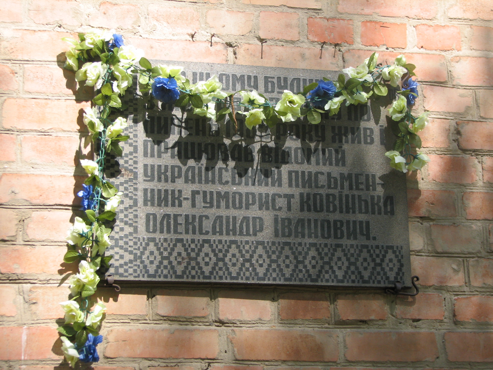 В цьому будинку жив і працював О.І.Ковінька